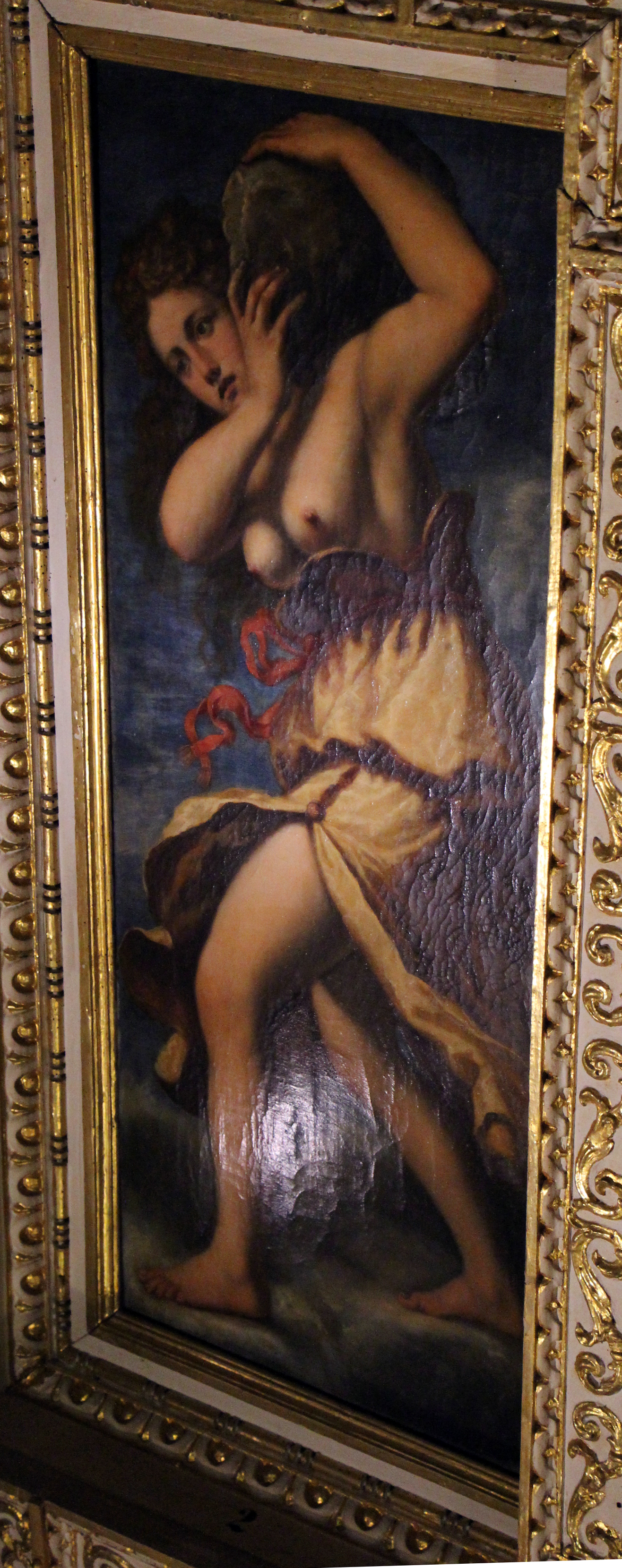 Casa Buonarroti - Galleria